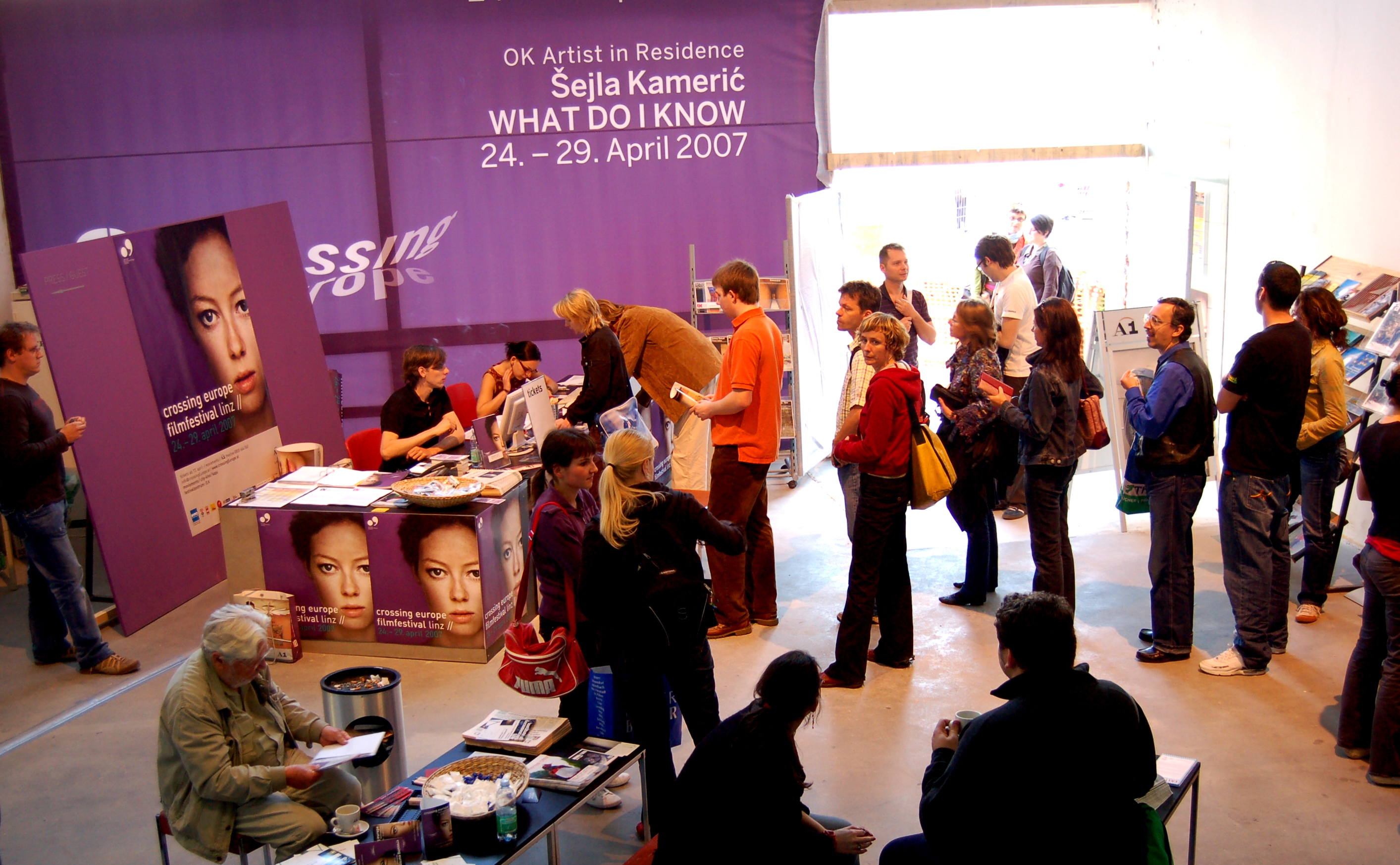 Besucher im Festivalzentrum des Crossing Europe Filmfestivals 2007 im O.K-Zentrum Linz